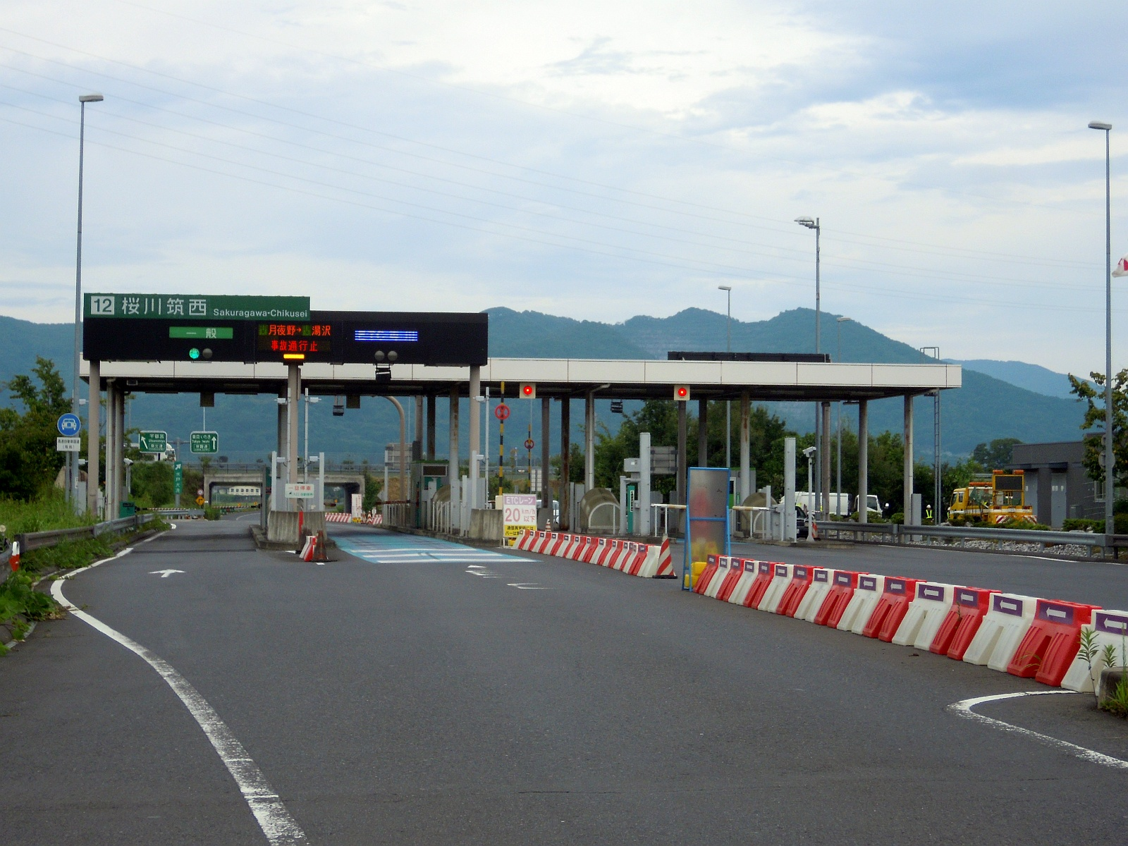 茨城県桜川市にある北関東自動車道の桜川筑西インターチェンジ料金所を一般道側から